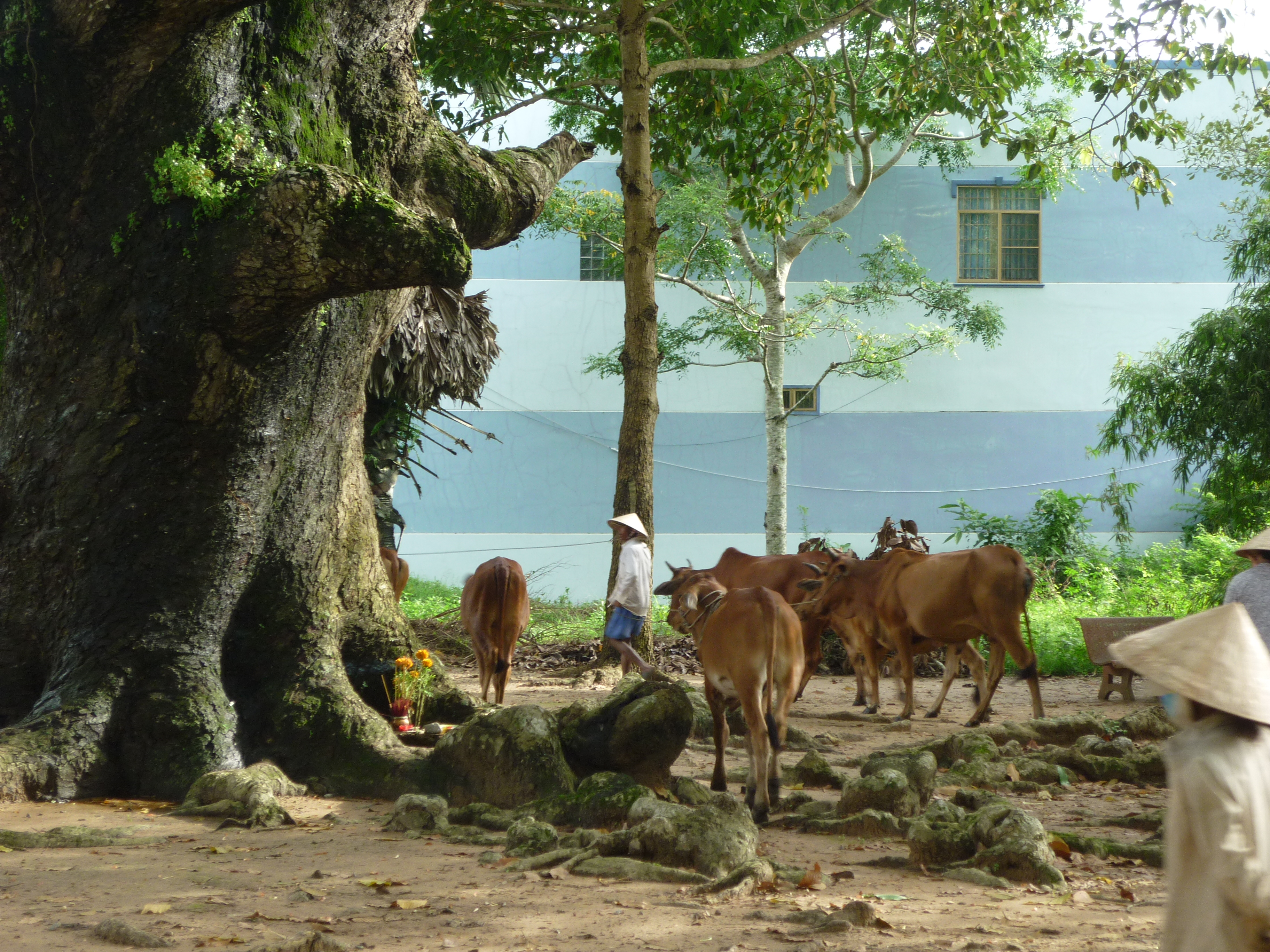 Cây Thần Linh ngàn tuổi của Việt Nam...